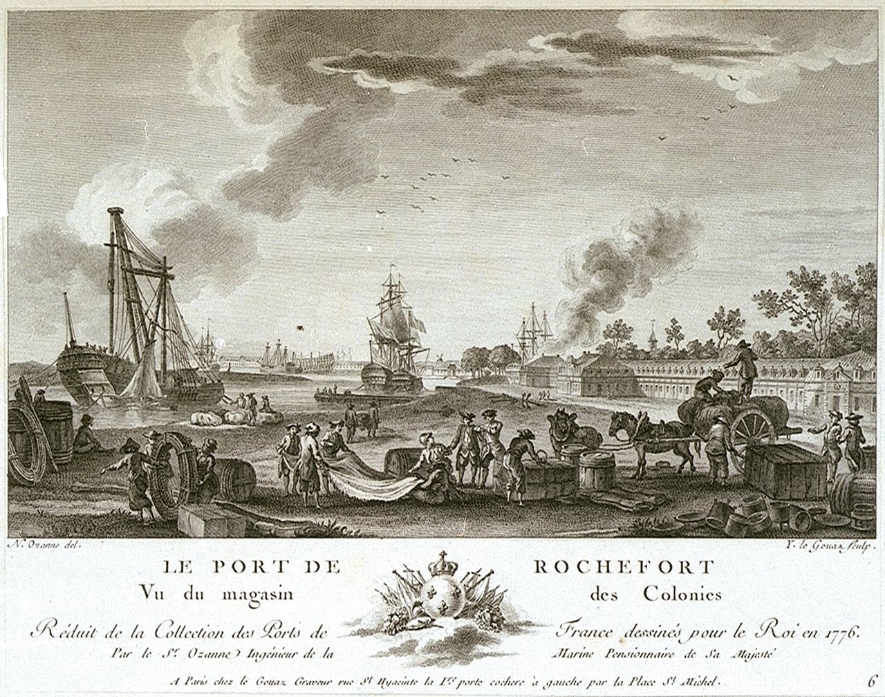 Le port de Rochefort vu du magasin des colonies. Réduit de la collection des ports de France dessinés pour le roi en 1776 par le sr Ozanne, ingénieur de la Marine pensionnaire de sa majesté. N. Ozanne del. Y. Le Gouaz sc. [seconde moitié du XVIIIe siècle] 185x261. Arch. dép. Char-Mar, 2 FI ROCHEFORT 1.